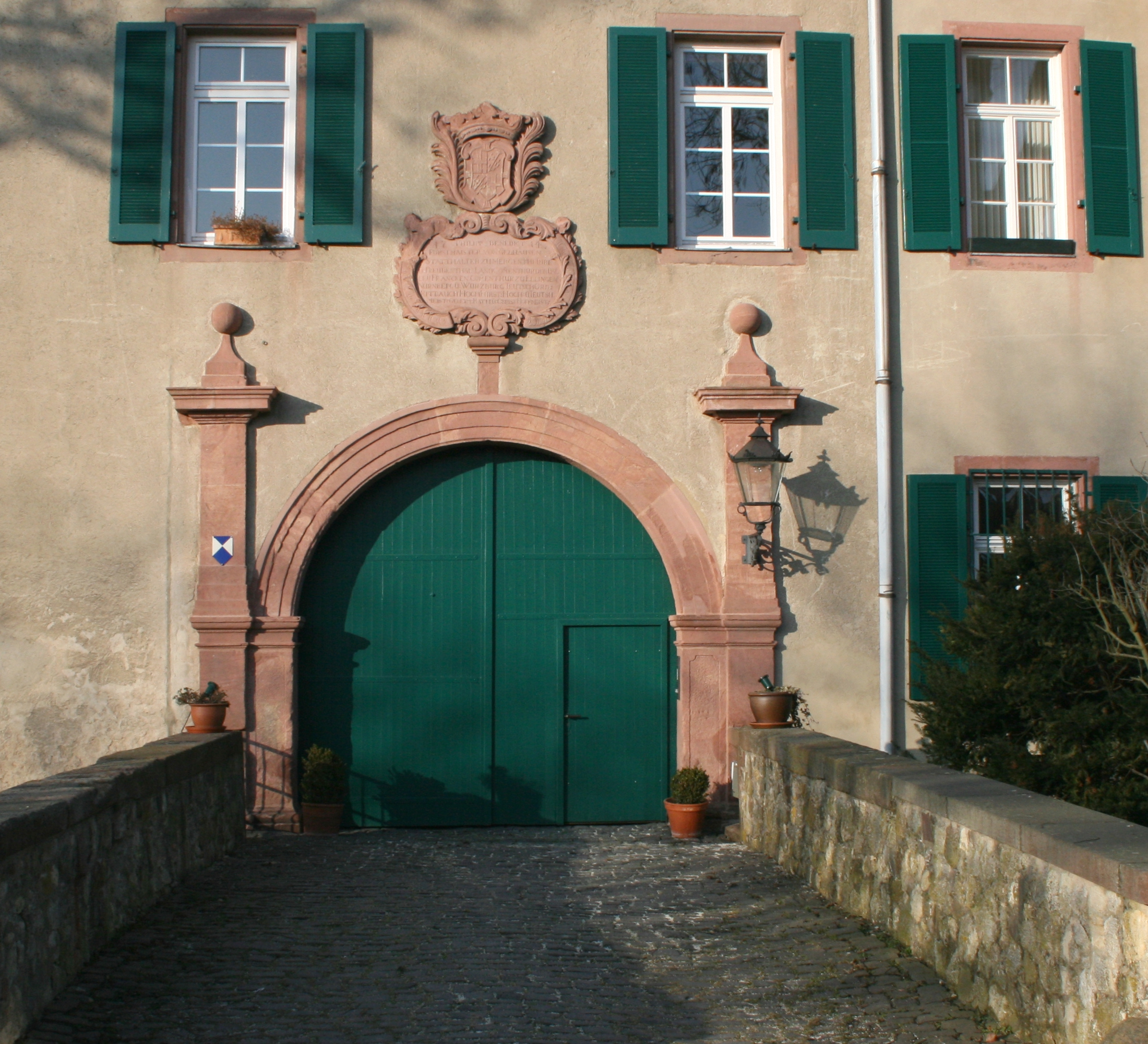 Deutschordensschloss Kloppenheim, Ansicht des Portals an der Südseite mit Inschrift.